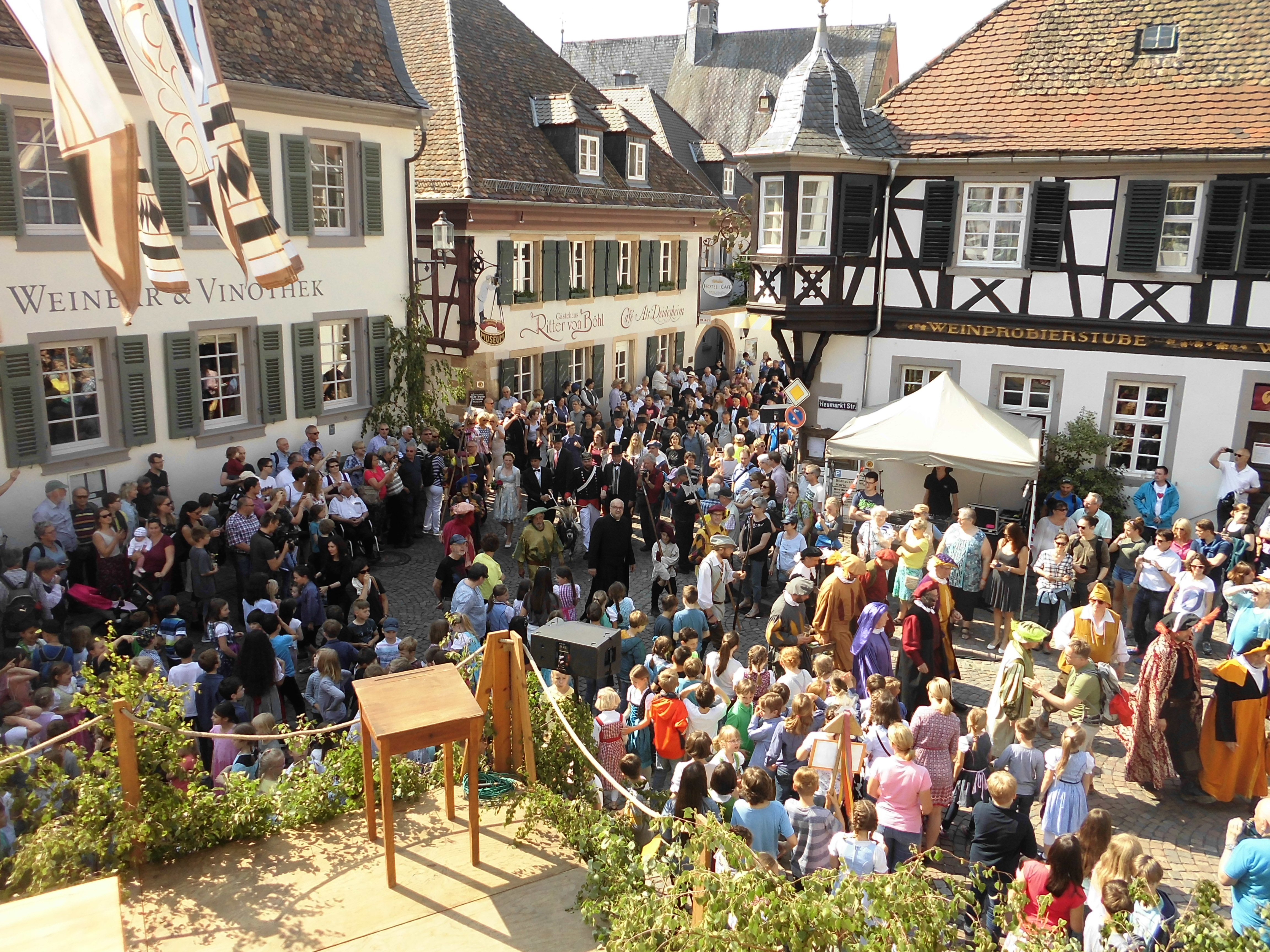 Die Wanderer, die Mitglieder des "Hohen Stadtgerichts", Stadträte, Bürgermeister, das Brautpaar und der Geißbock treffen vor dem historischen Rathaus ein